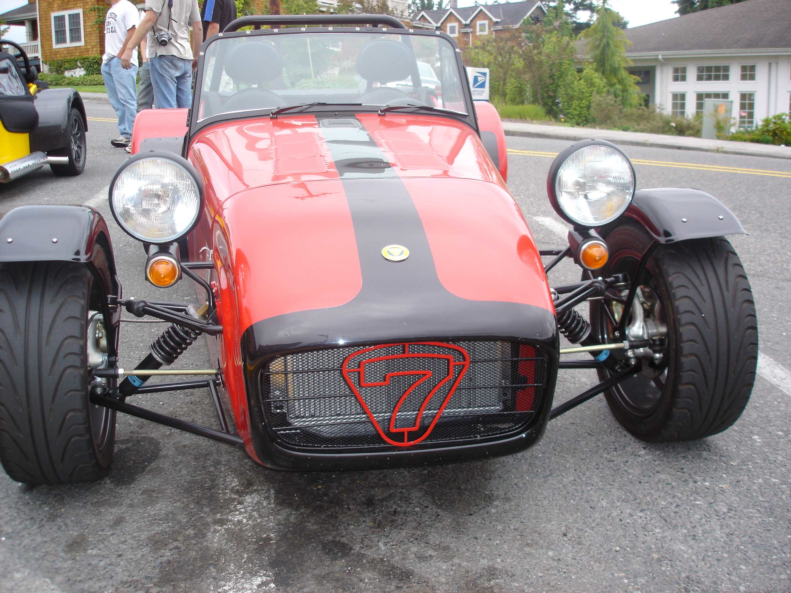 Caterham SV (2004 Model)